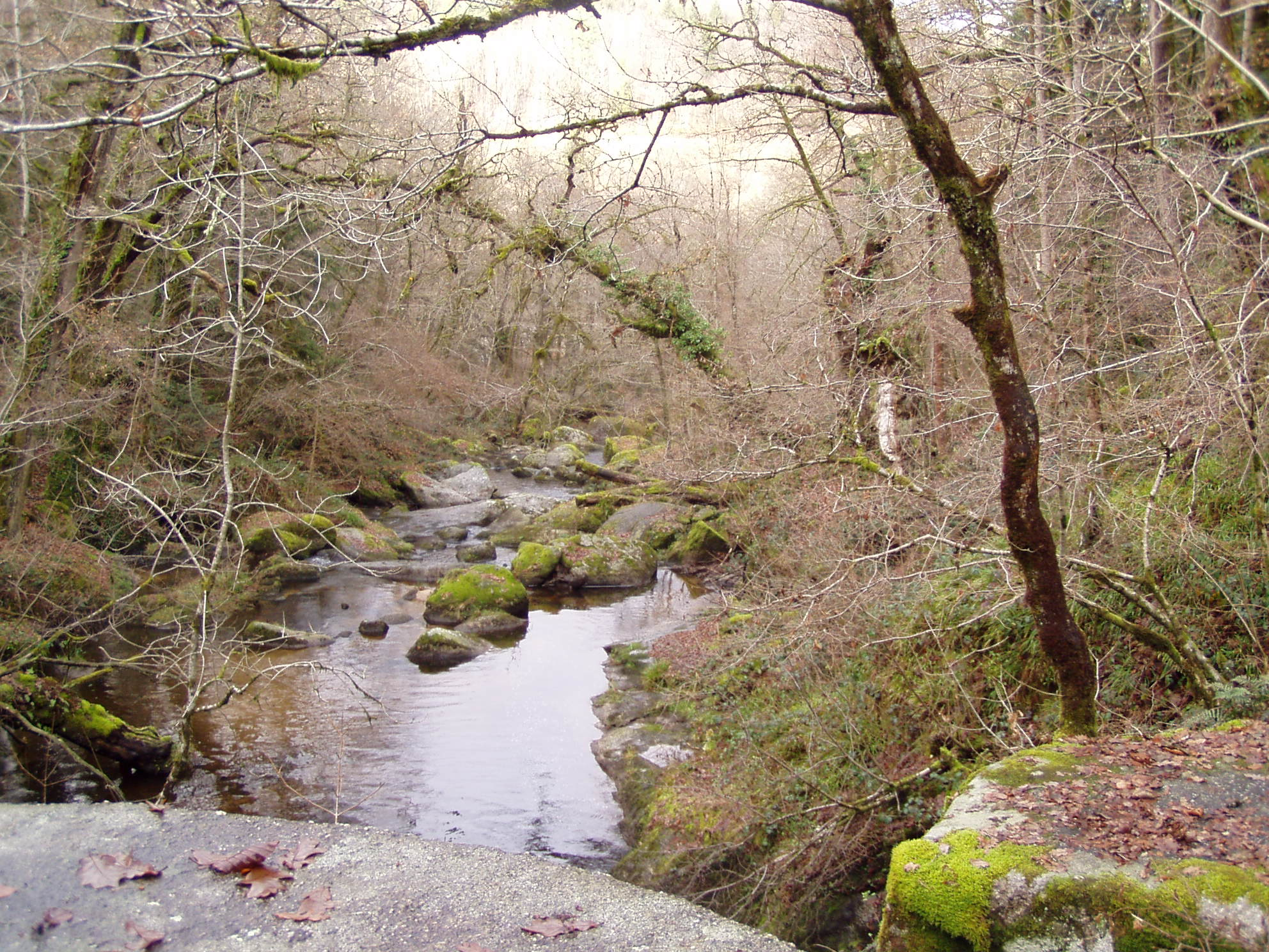 La Maulde au pied de la cascade des Jarrauds, dans le département de la Creuse